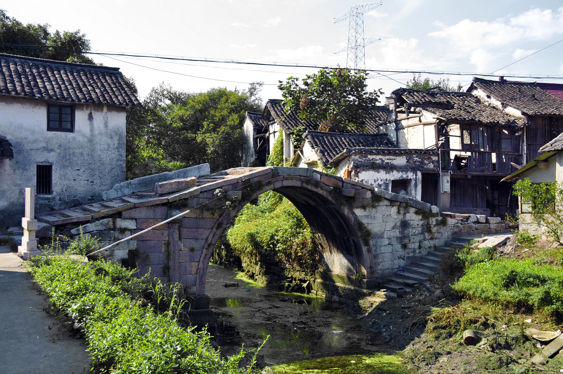 金泾桥 清